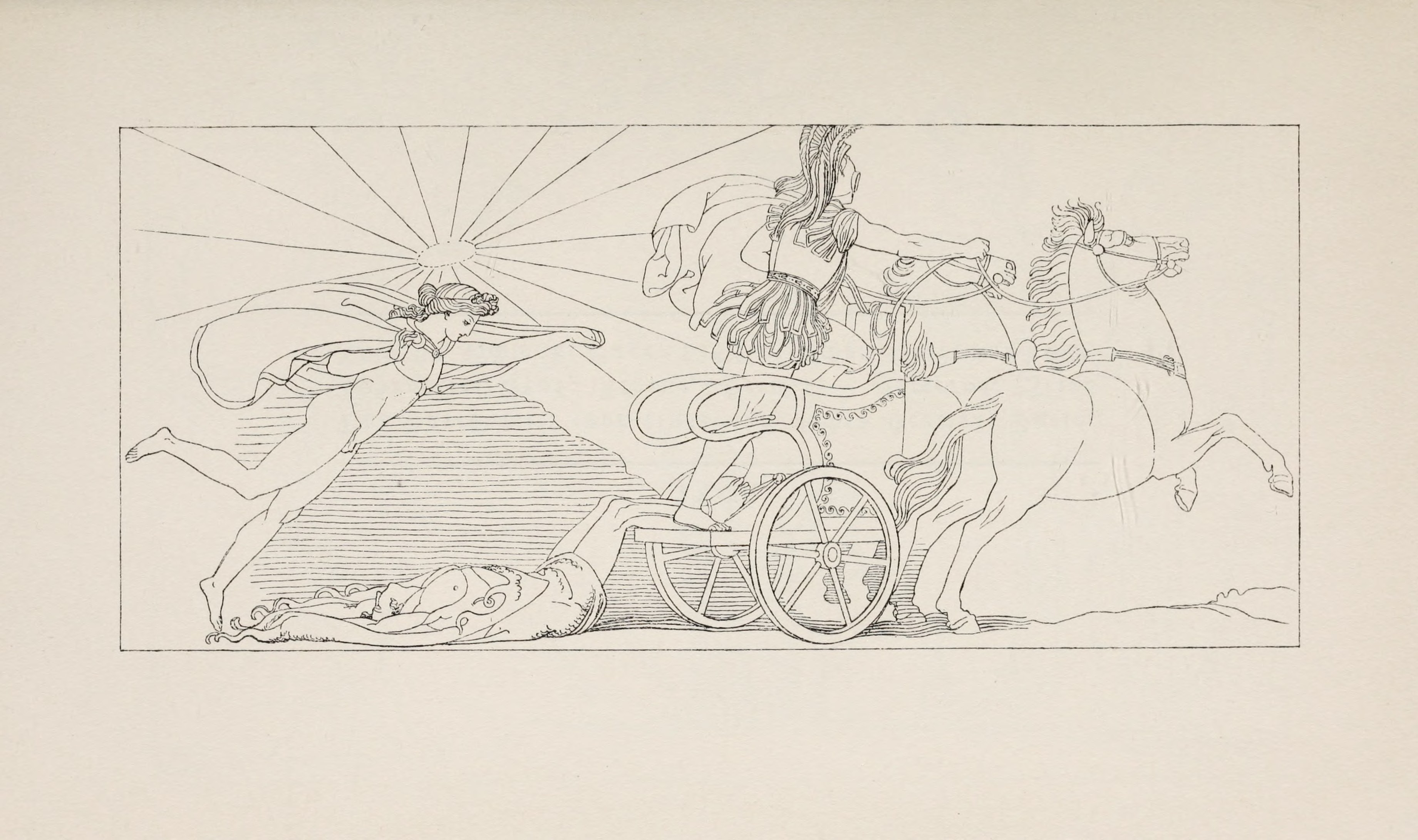 Achill den Leichnam Hektors schleifend. – Homer, Ilias XXIV. 15. Schwab, Sagen des klassischen Altertums II.45.